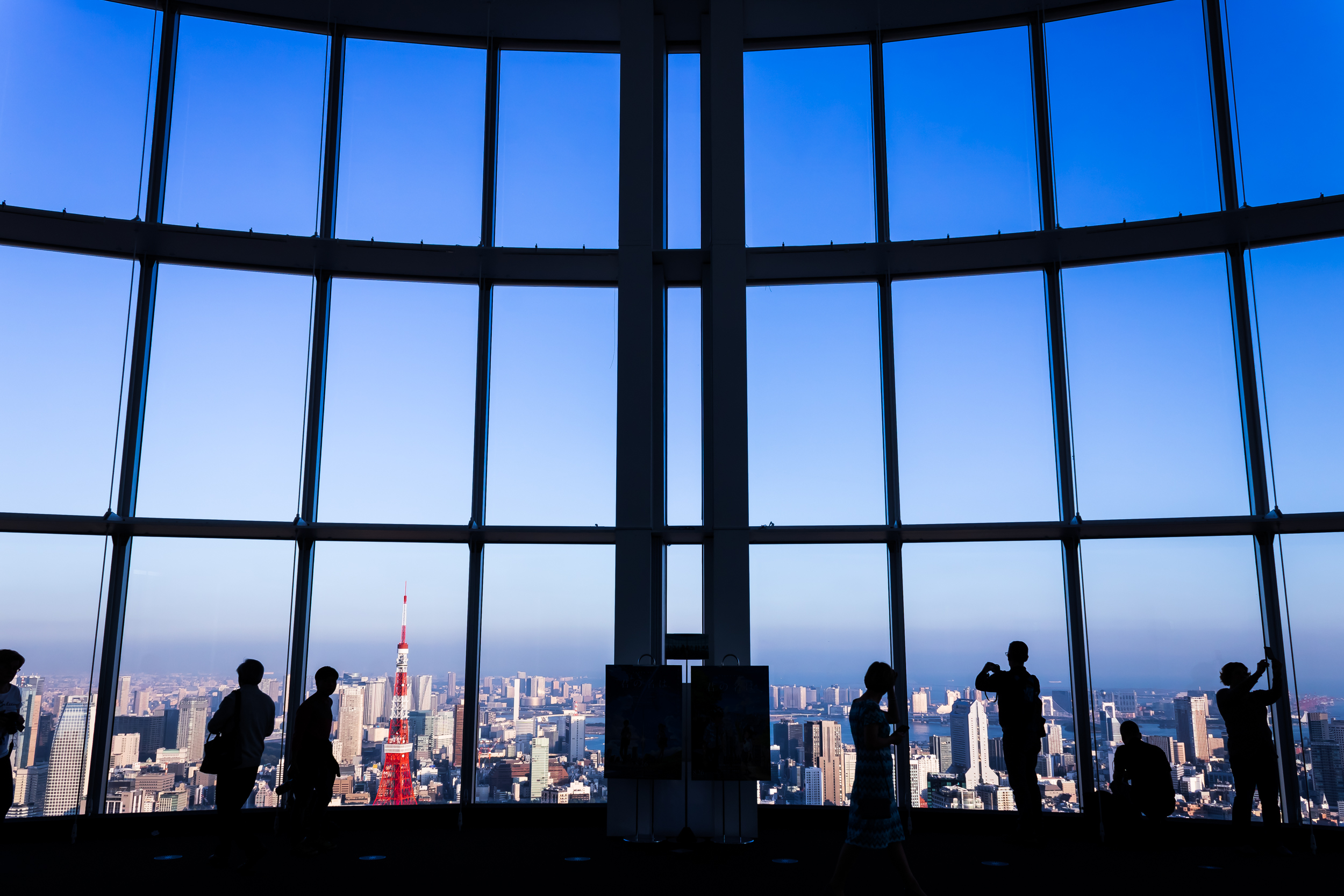 六本木ヒルズ森タワー、東京シティービューより